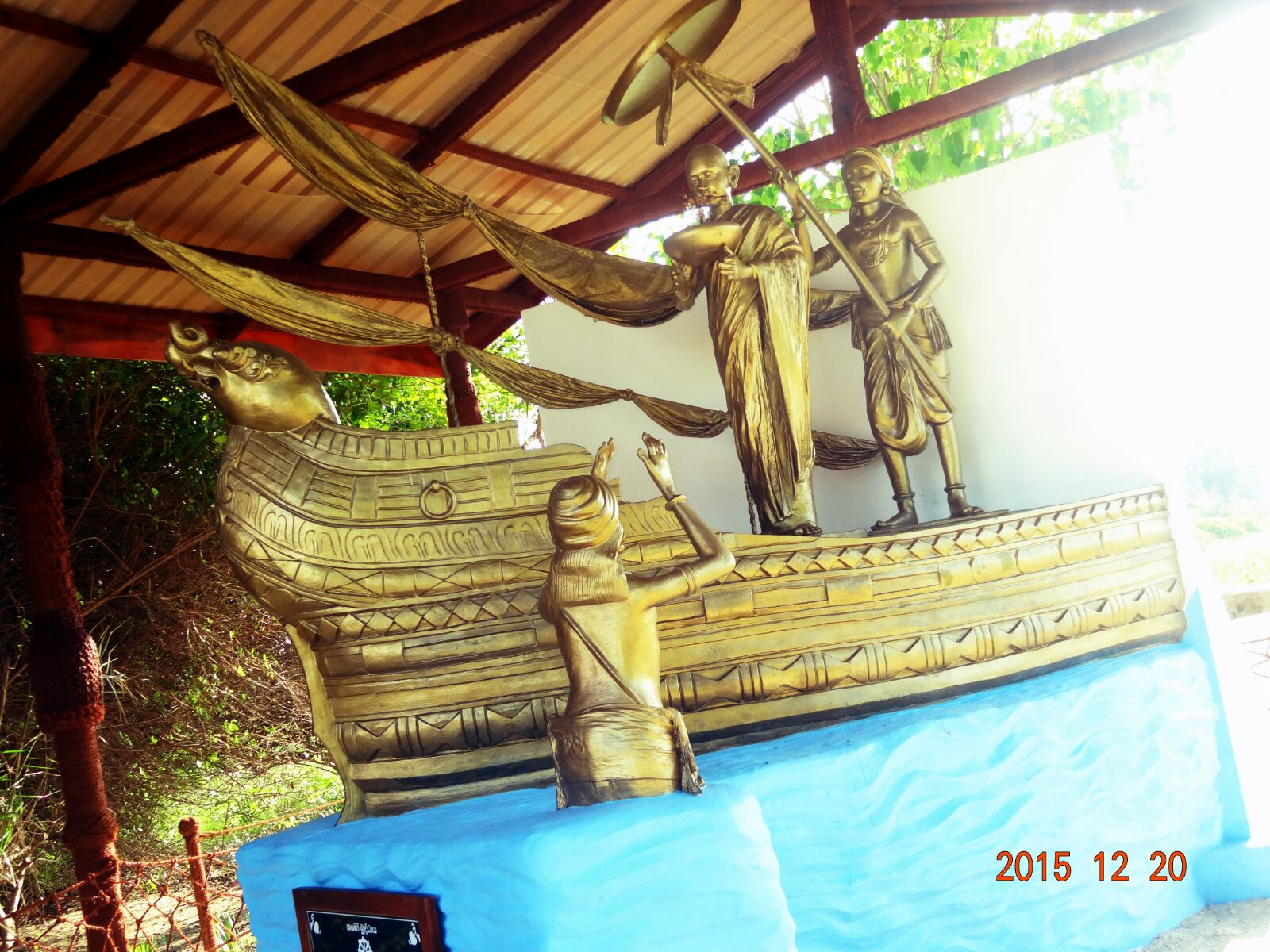 கப்பல்